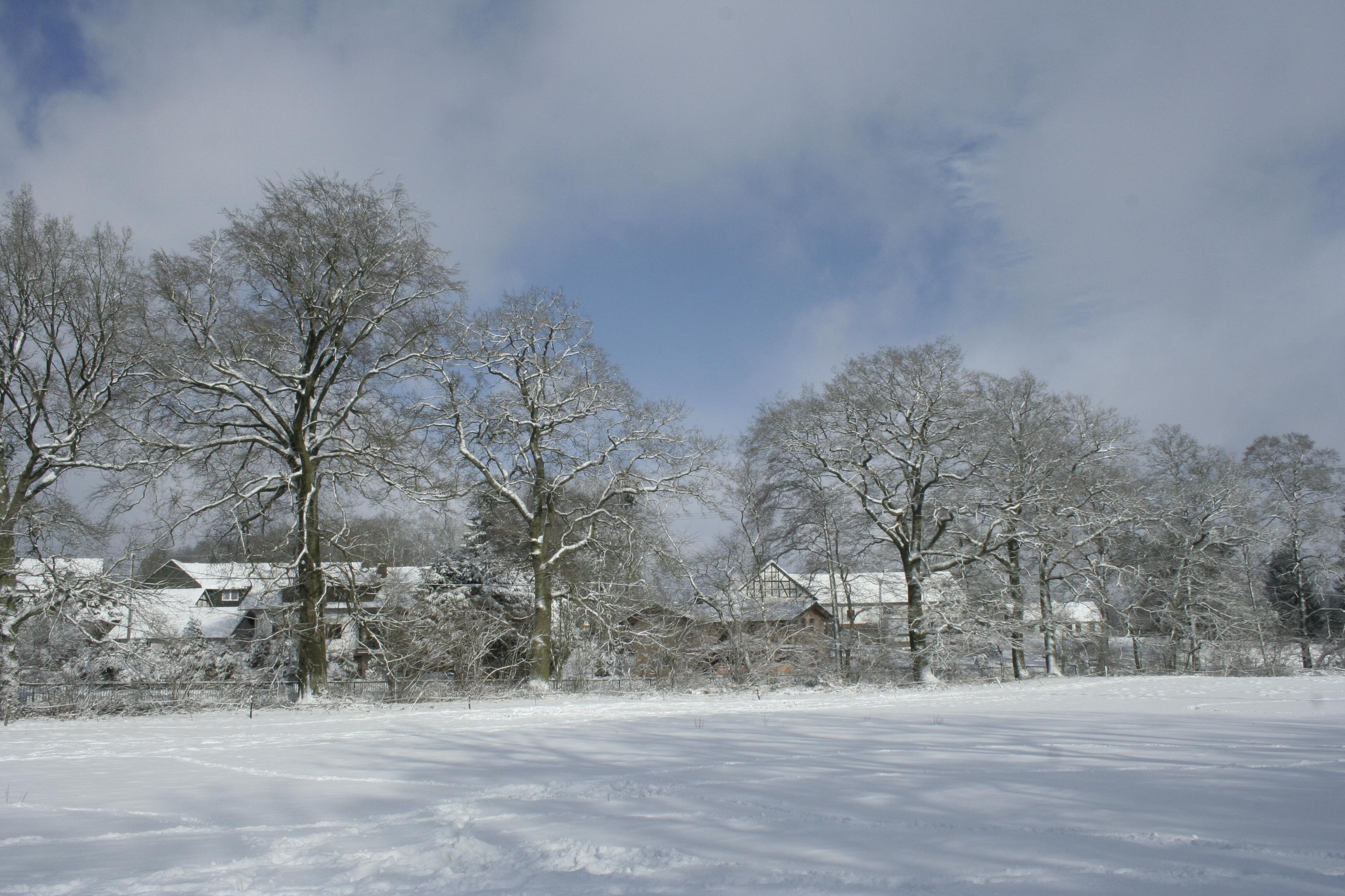 Alter Eichen- und Buchenbestand in Ersfeld, Winter 2010